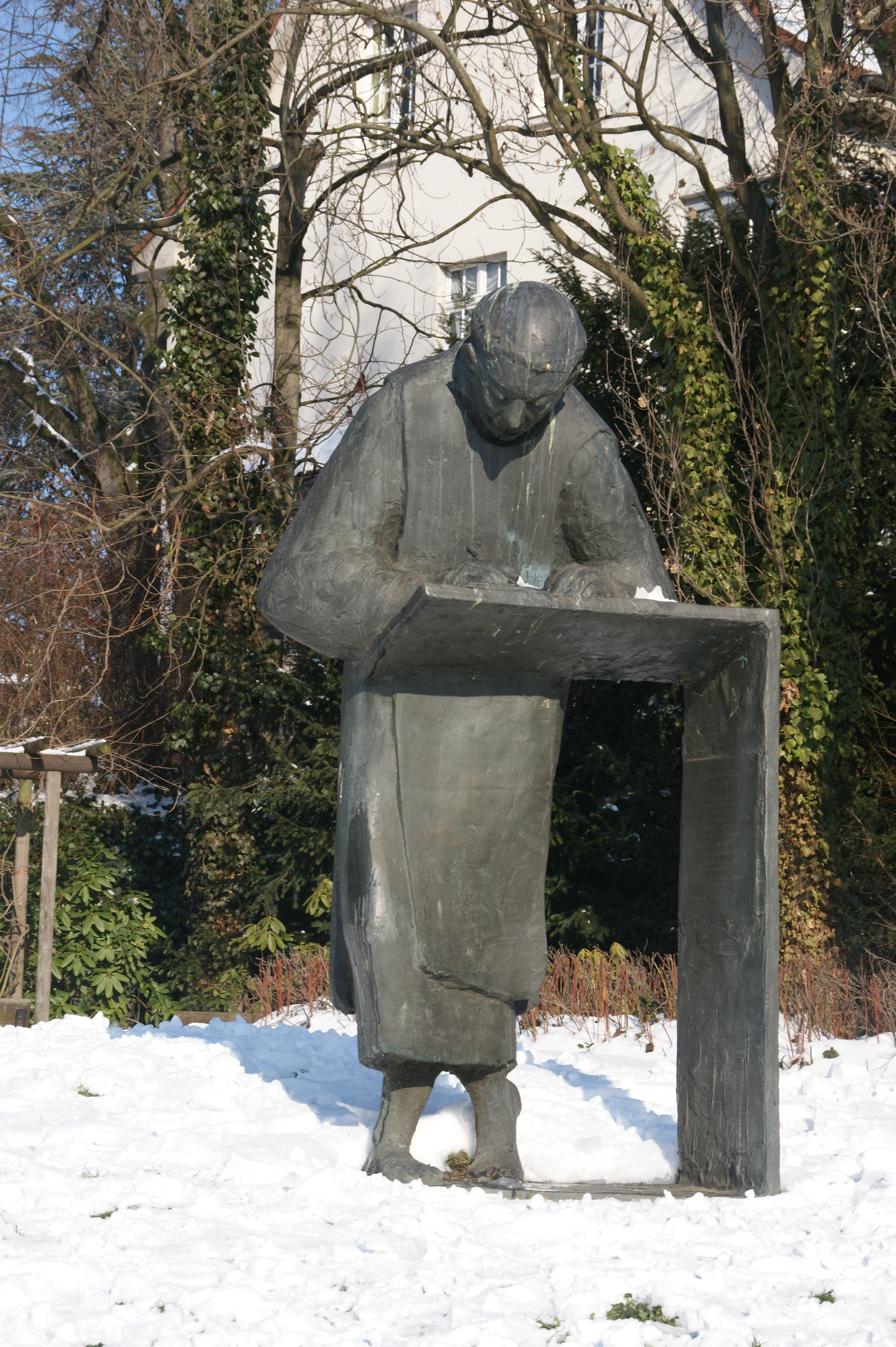 Caesariusdenkmal in Königswinter-Oberdollendorf – Bronzeplastik des Caesarius von Heisterbach (ca. 1180–1240) von Ernemann Sander, 1991